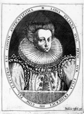 Luise Juliane von Oranien (1576-1644), Kurfürstin von der Pfalz, Gräfin von Nassau